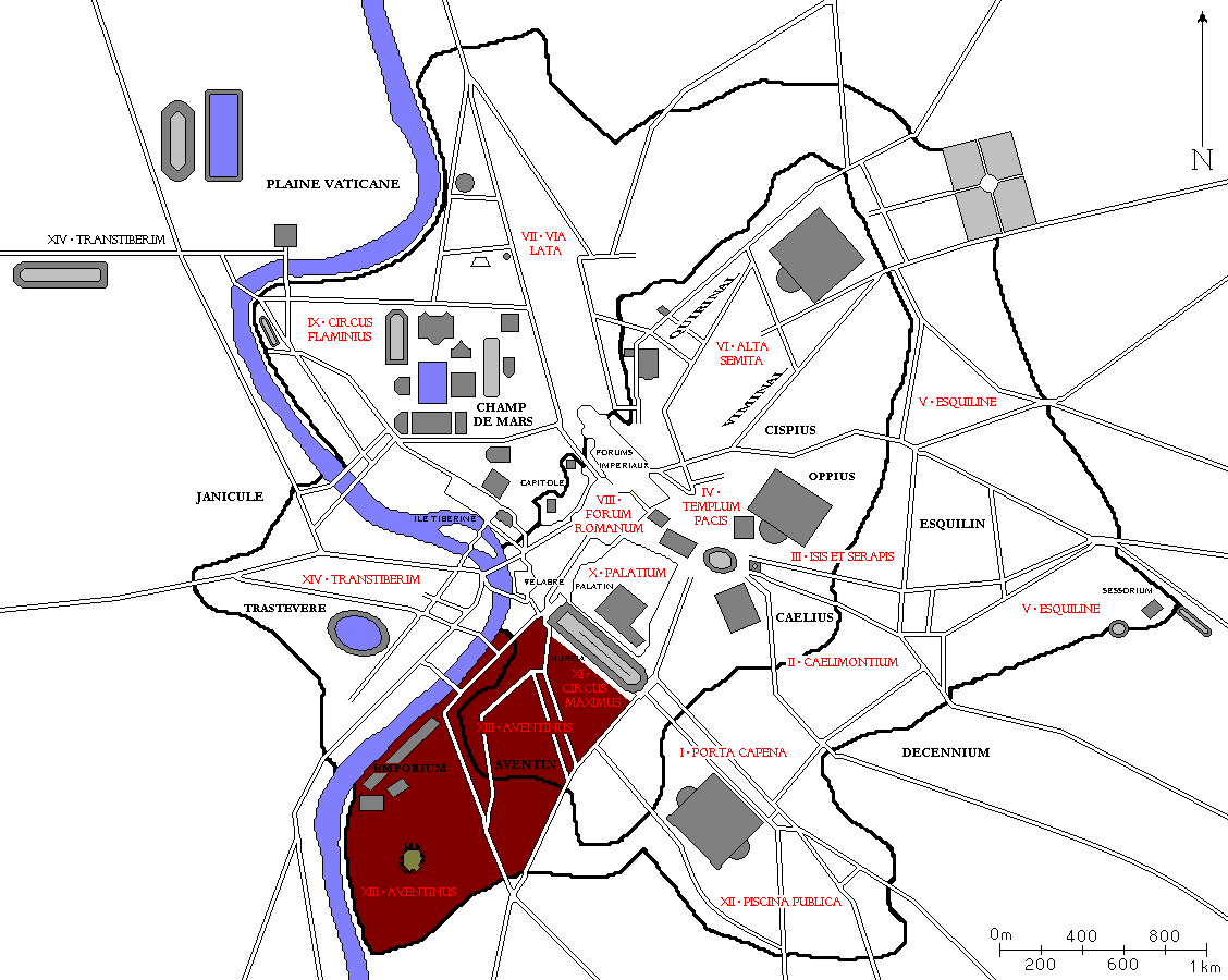 Plan de Rome avec la treizième région des 14 régions d'Auguste